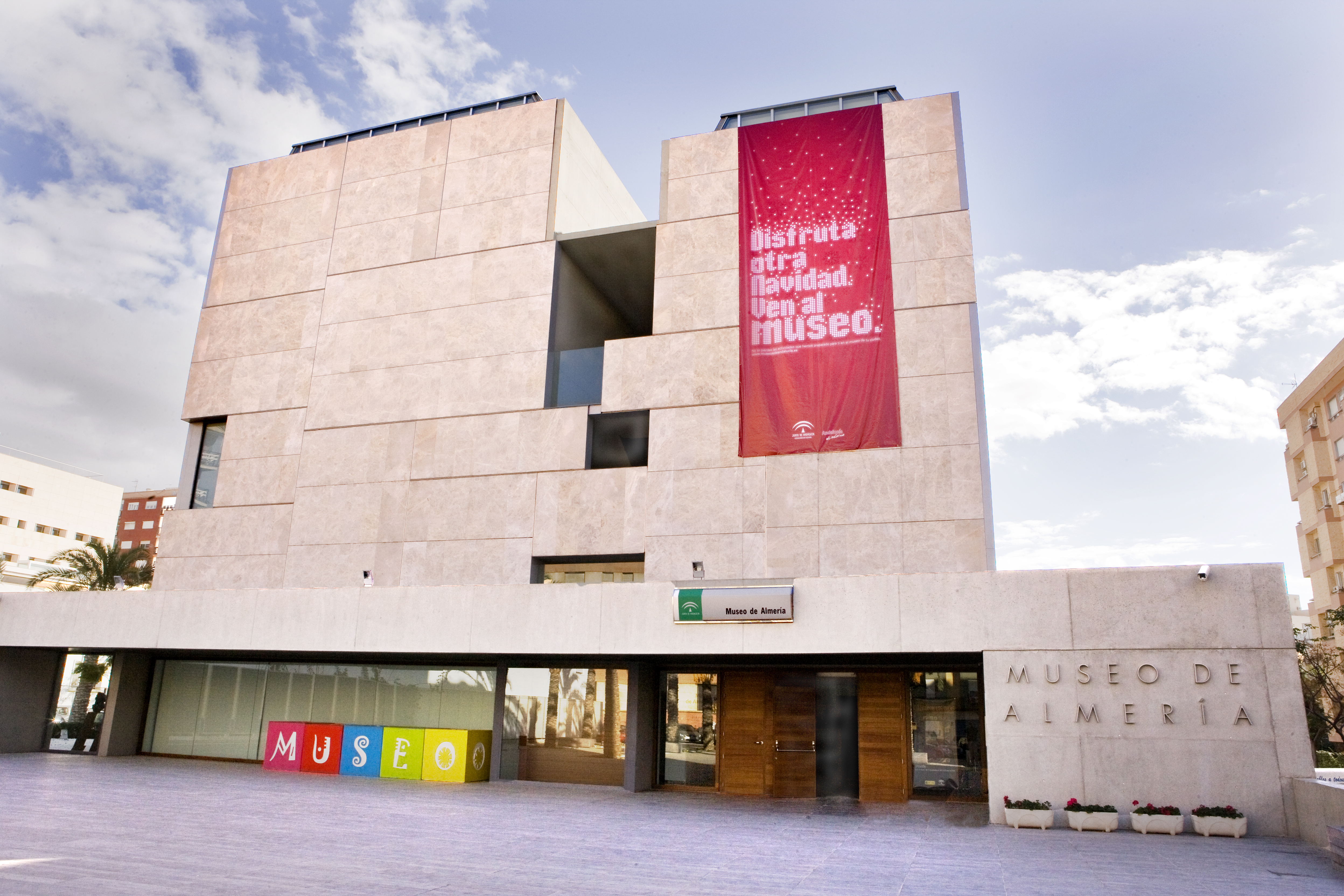 Fachada del Museo de Almería